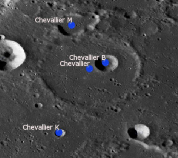 Cráter Chevallier (LRO)